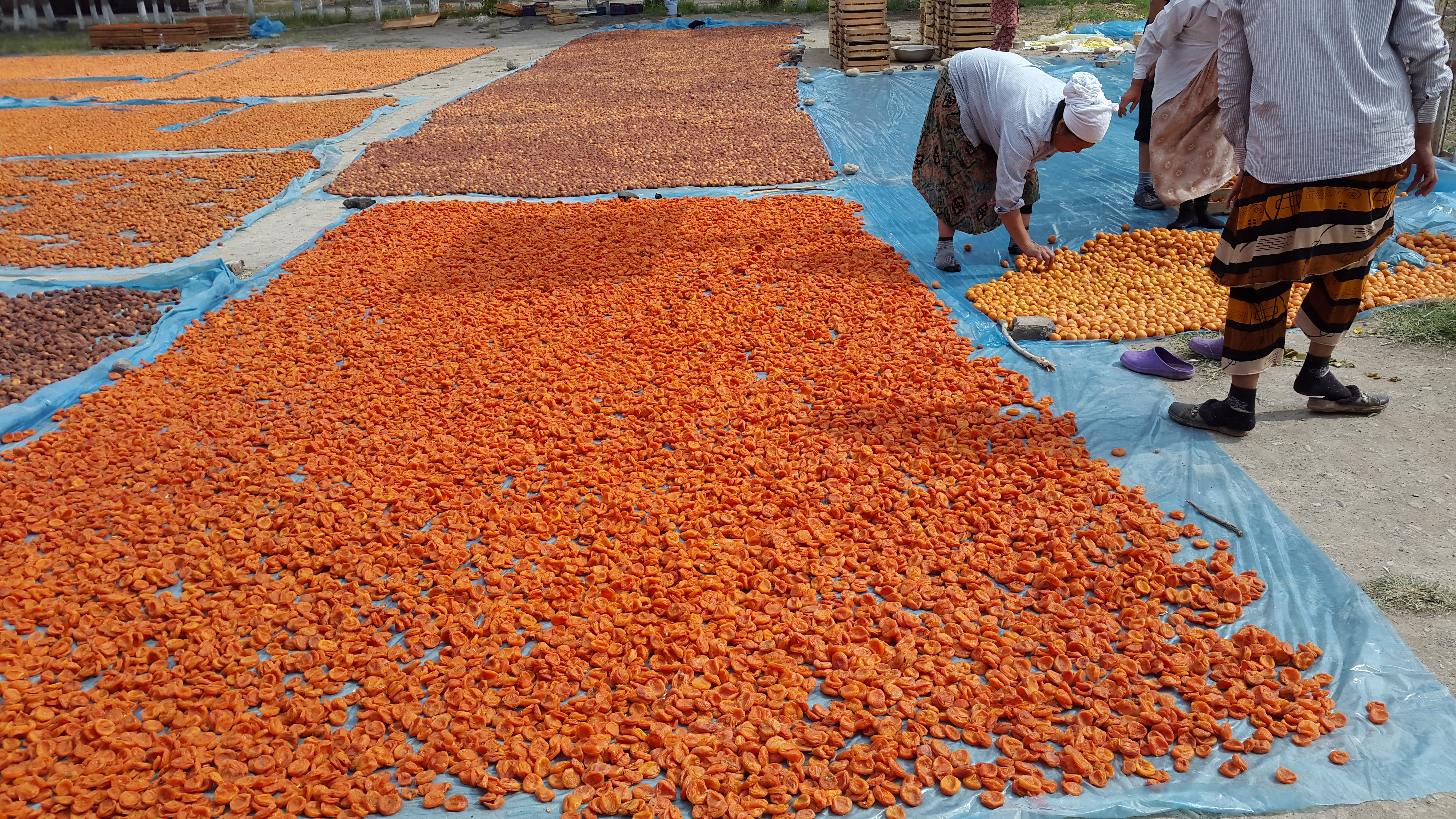 Сушка плодов абрикоса в открытом месте (Фергана, Узбекистан)